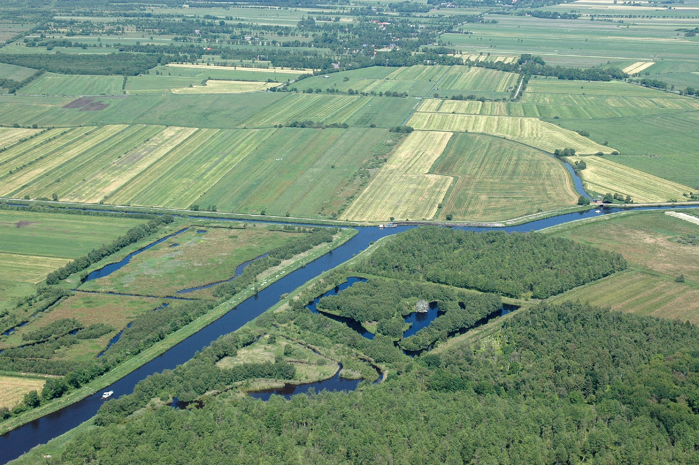 Hadelner Kanal zwischen Bederkesaer und Flögelner See Fotoflug vom Flugplatz Nordholz-Spieka über Cuxhaven und Wilhelmshaven